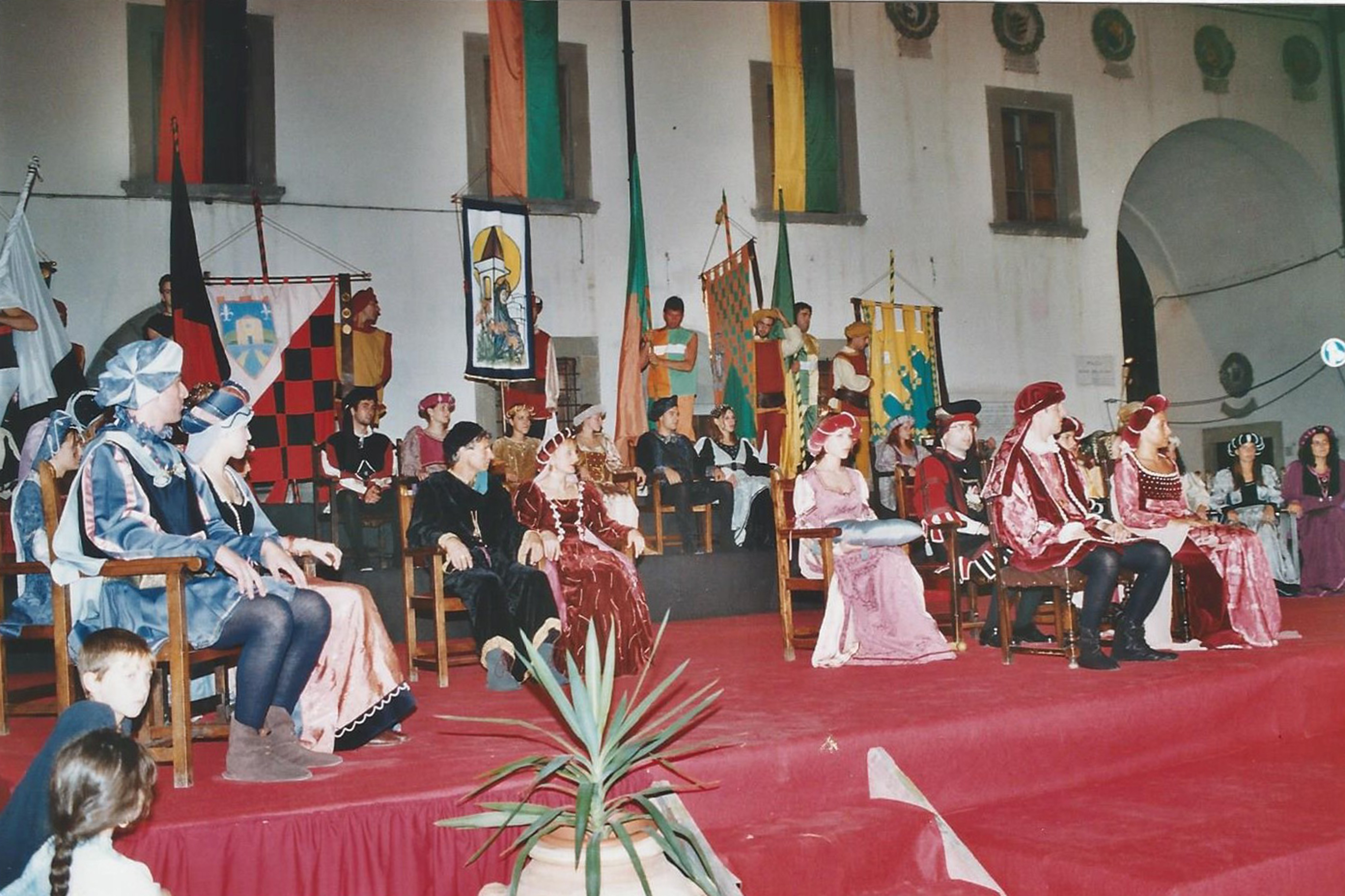 Palio dei Lumi, Pieve Santo Stefano